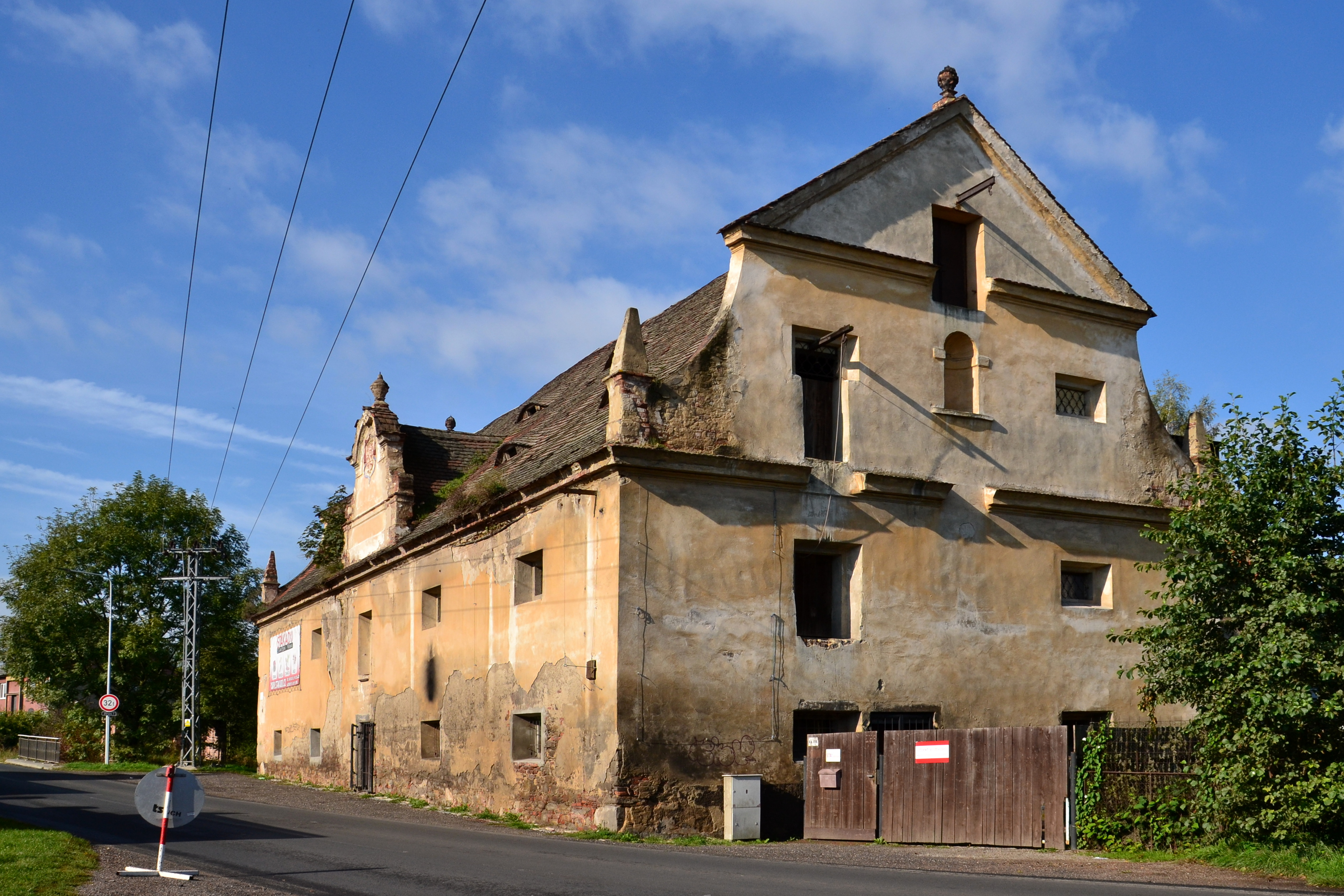 Barokní sýpka v Údlicích, Údlice.